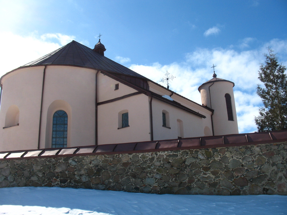 Беларуская (тарашкевіца): Камаі, Касьцёл Сьвятога Яна Хрысьцiцеля